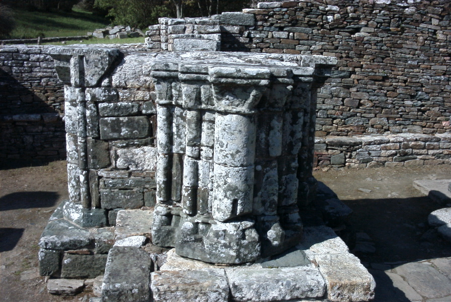 Chapelle de Languidou : pile nord de l'arc diaphragme